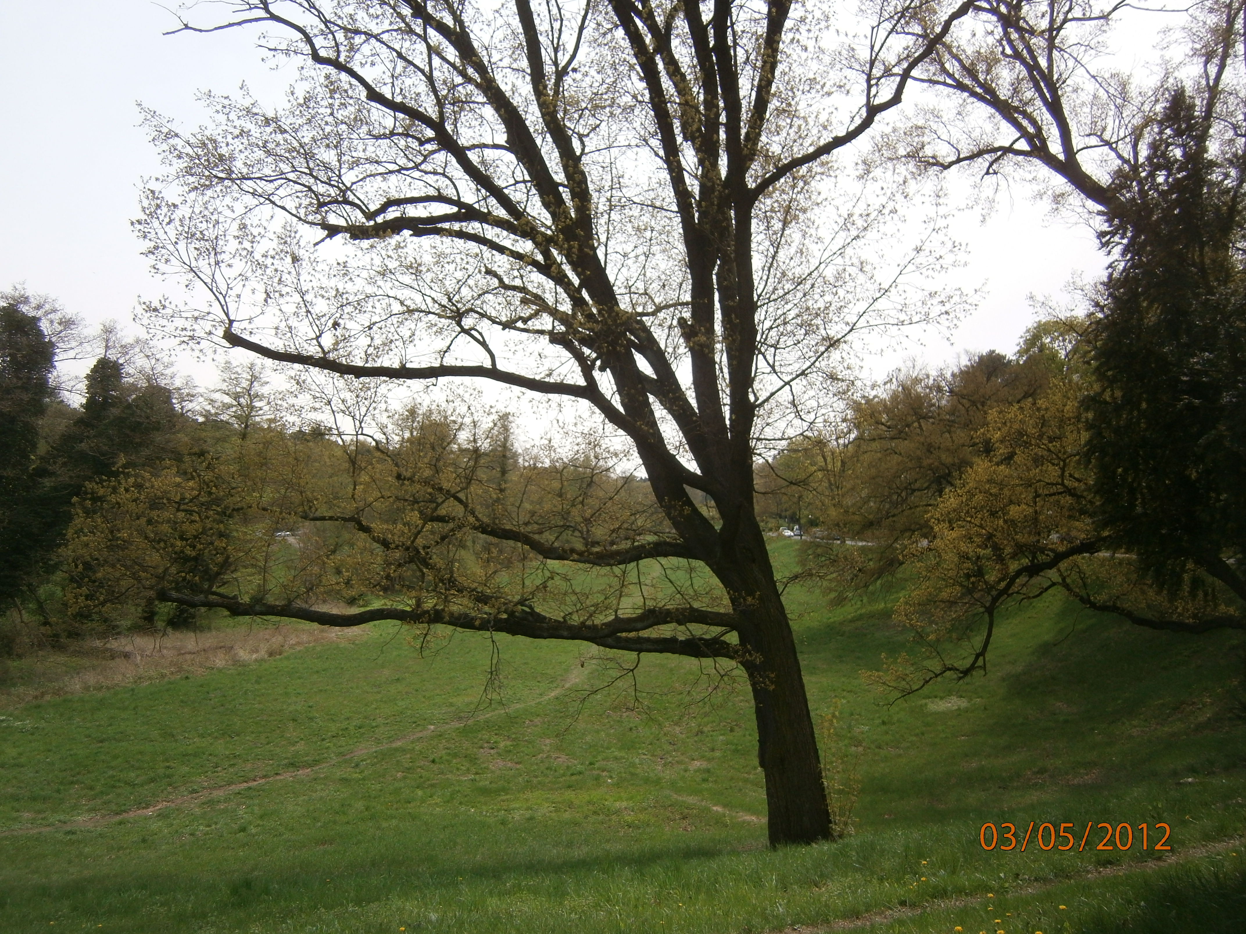 An der Rehwiese ist eine Straße im Ortsteil Berlin-Nikolassee (hier in Blickrichtung: Süd)